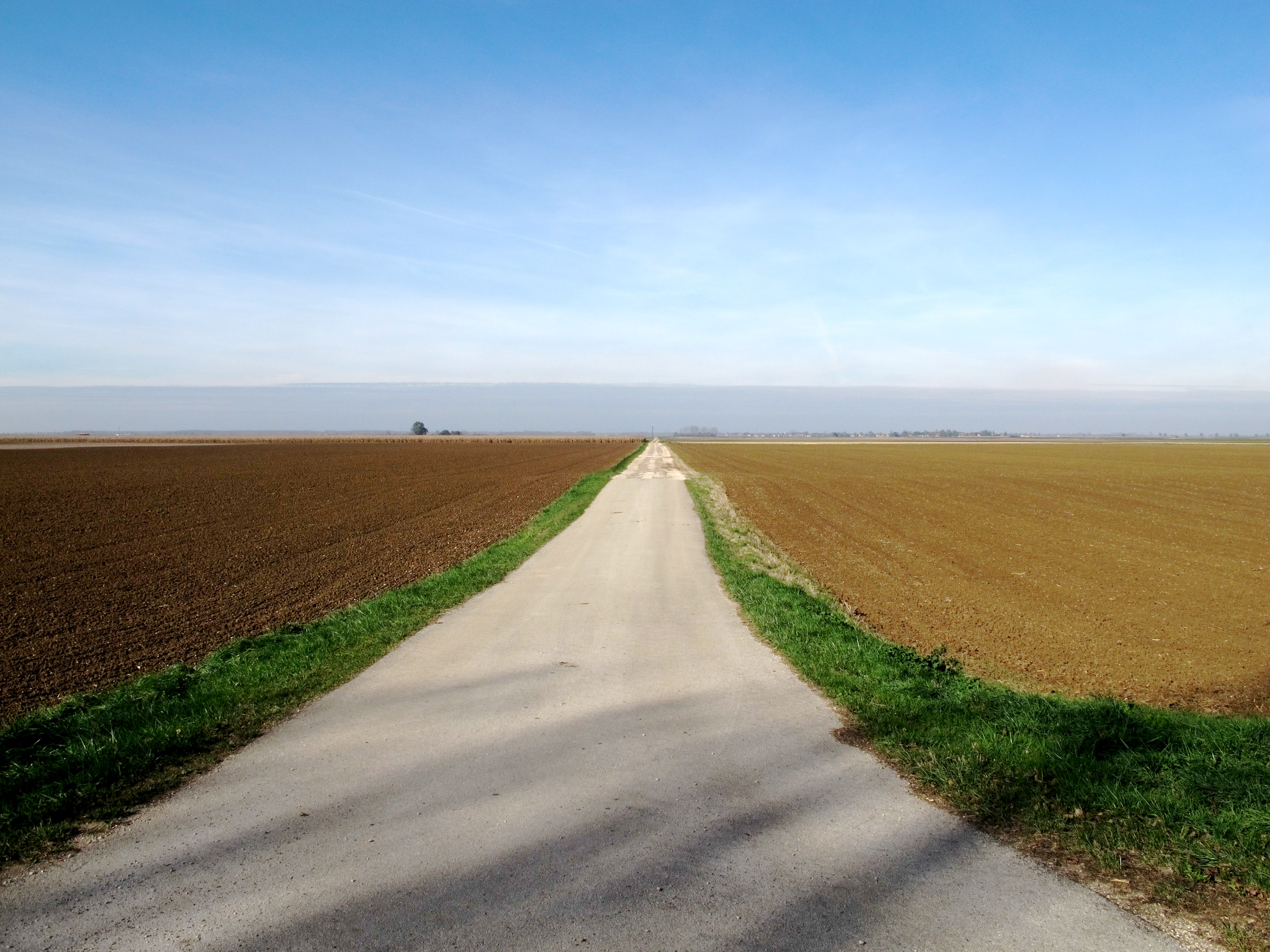 Limite entre natures de sol dans le Finage de Dole.